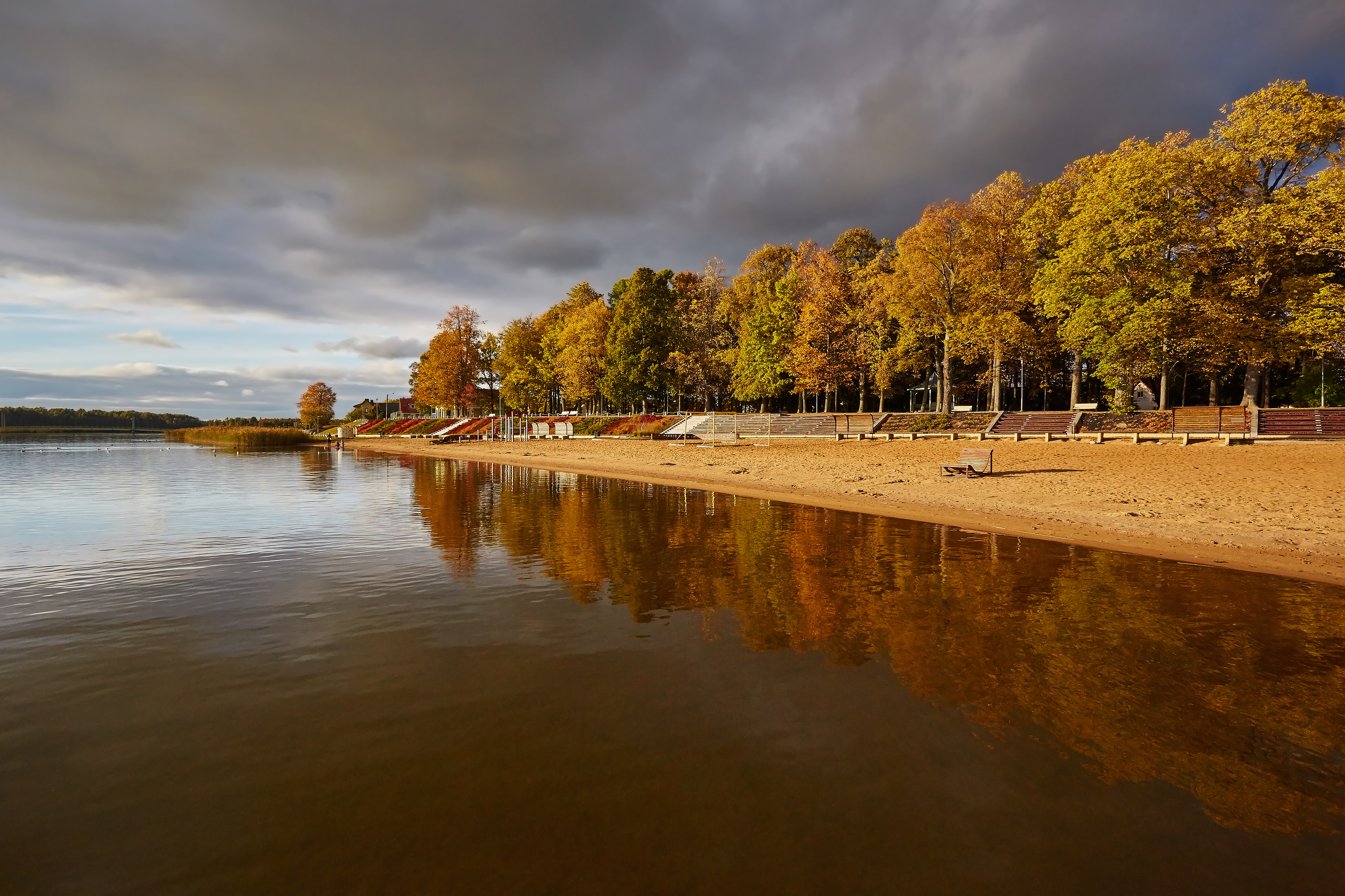 Tamula järv ja järveäärne promenaad sügisel